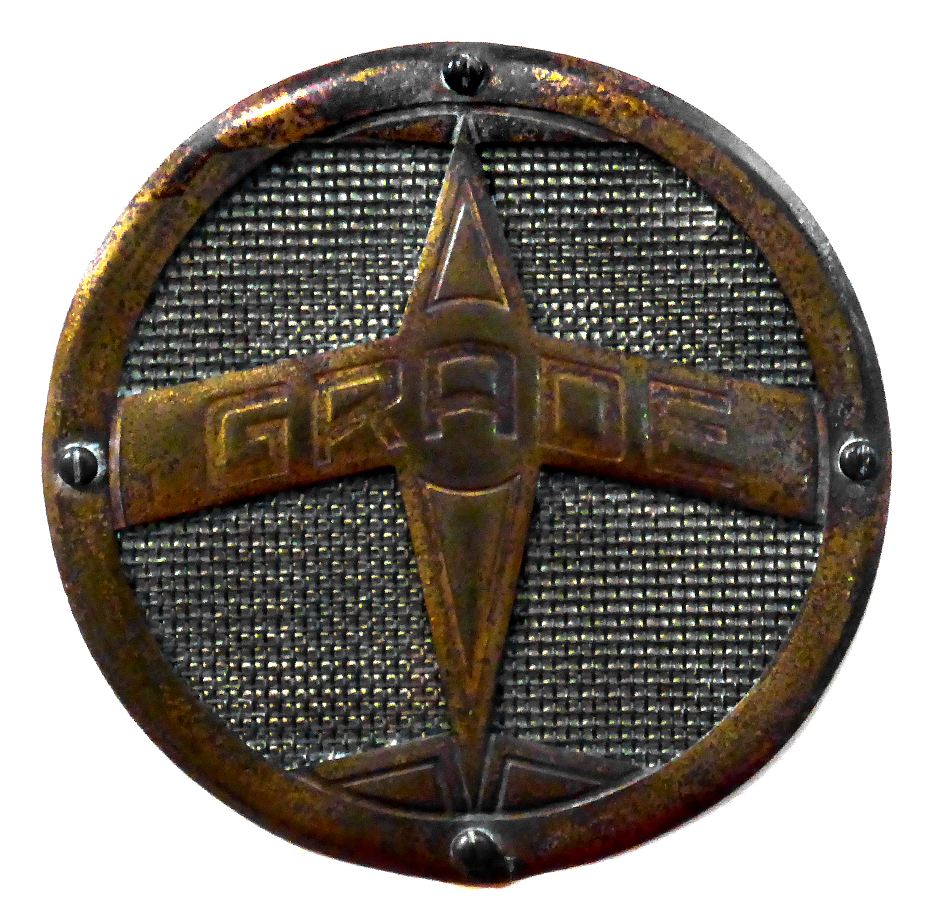 Emblem des Grade-Wagen 4/16 PS, Baujahr 1922. Ausgestellt im Deutschen Technikmuseum in Berlin. Wikipedianische KulTour am 10. Oktober 2015 in der Ausstellung des Museums.